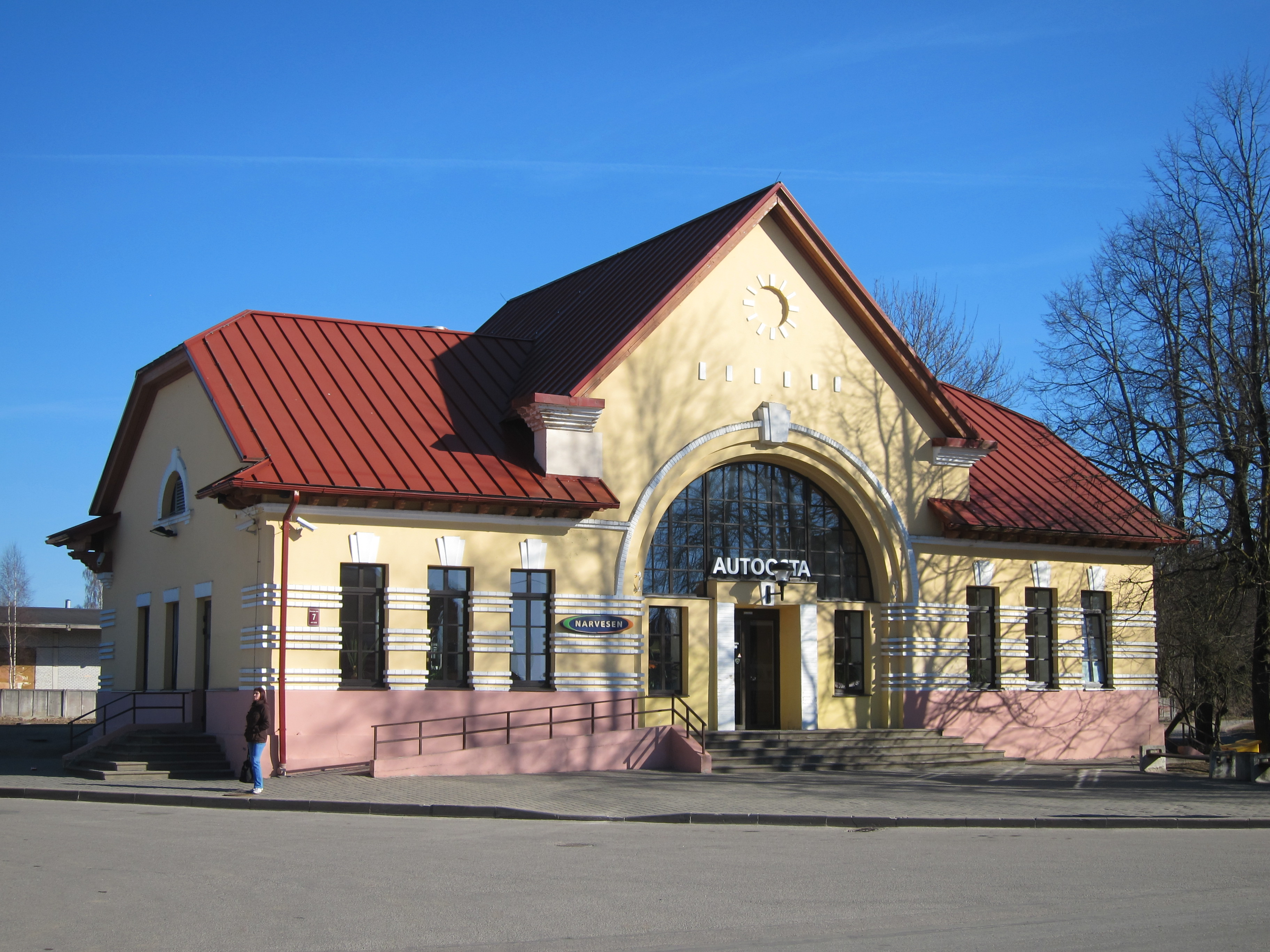 Limbažu stacijas ēka (tagadējā autoosta) no Stacijas ielas puses